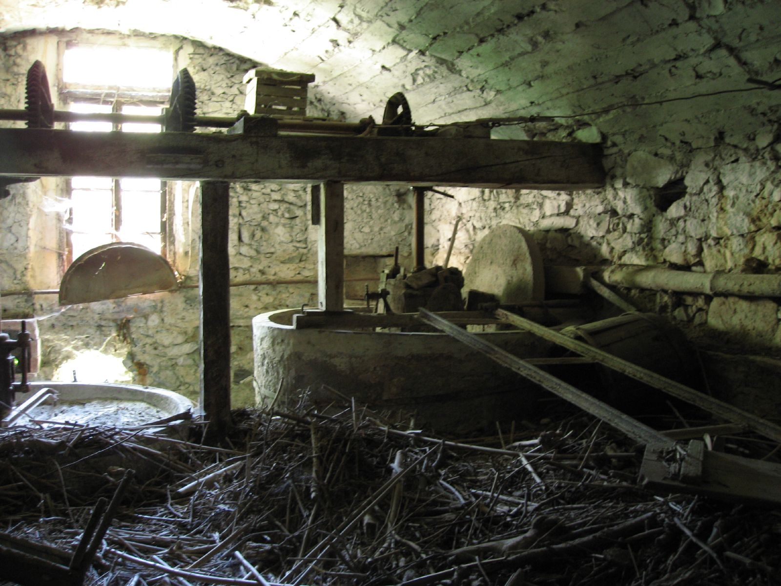 Frantoio tradizionale, oggi dismesso, sopra Ventimiglia, sulla Riviera dei Fiori, in Italia.